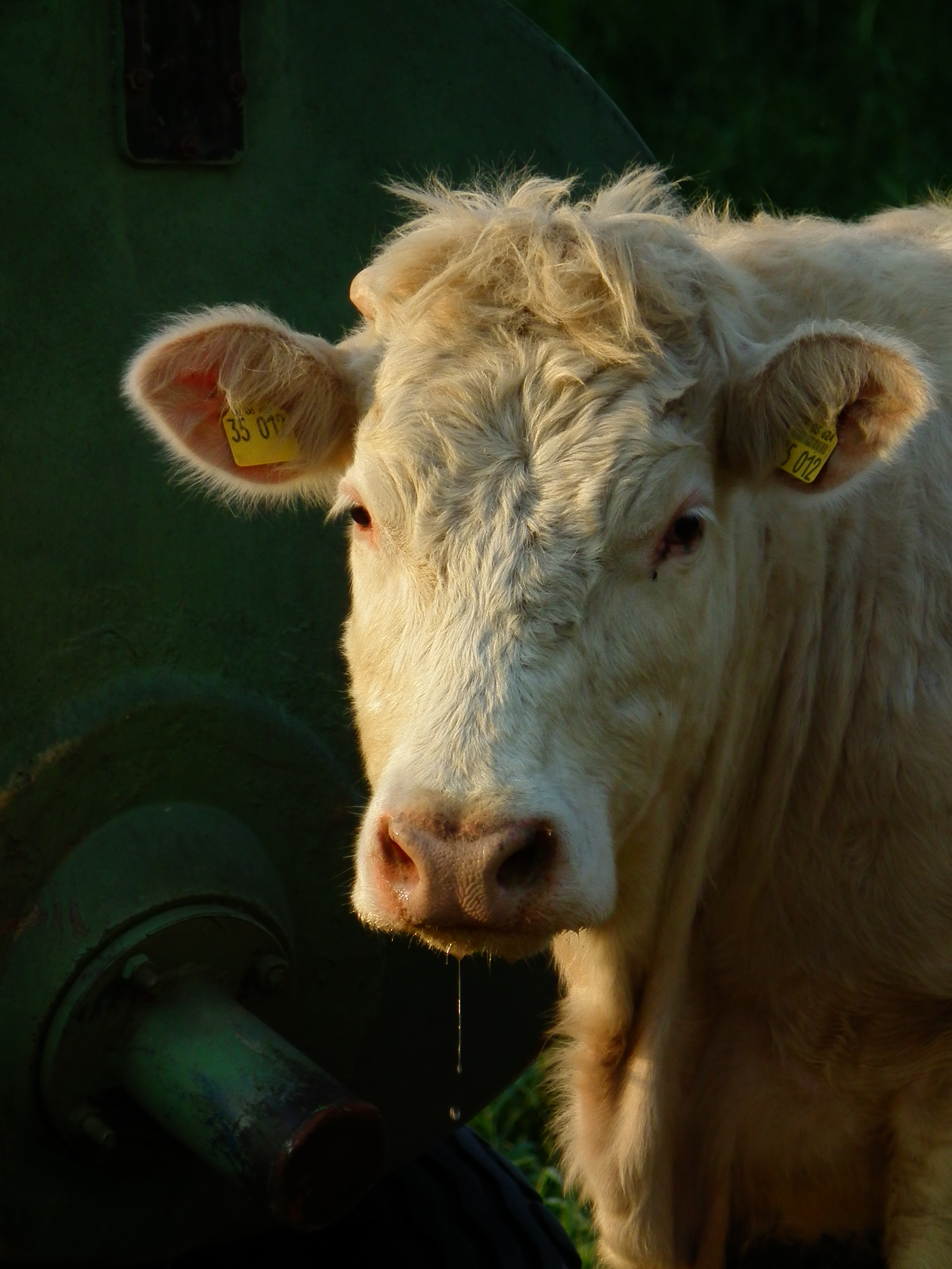 Charolais auf einer Weide in der Nähe von Linnenbach im Kreis Bergstraße (Hessen, Deutschland)